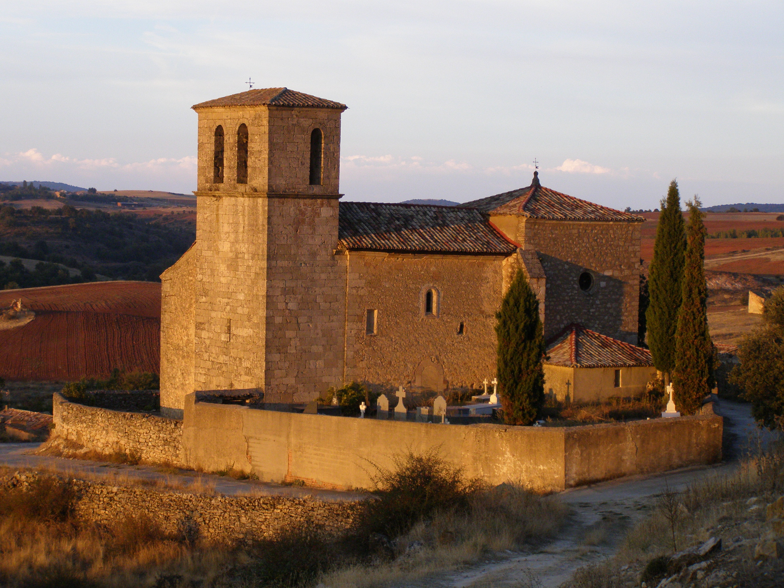 Iglesia de Santa Catalian en Angon, alberga un retablo barroco interesante, teniendo en la parte trasera anexo el cementerio